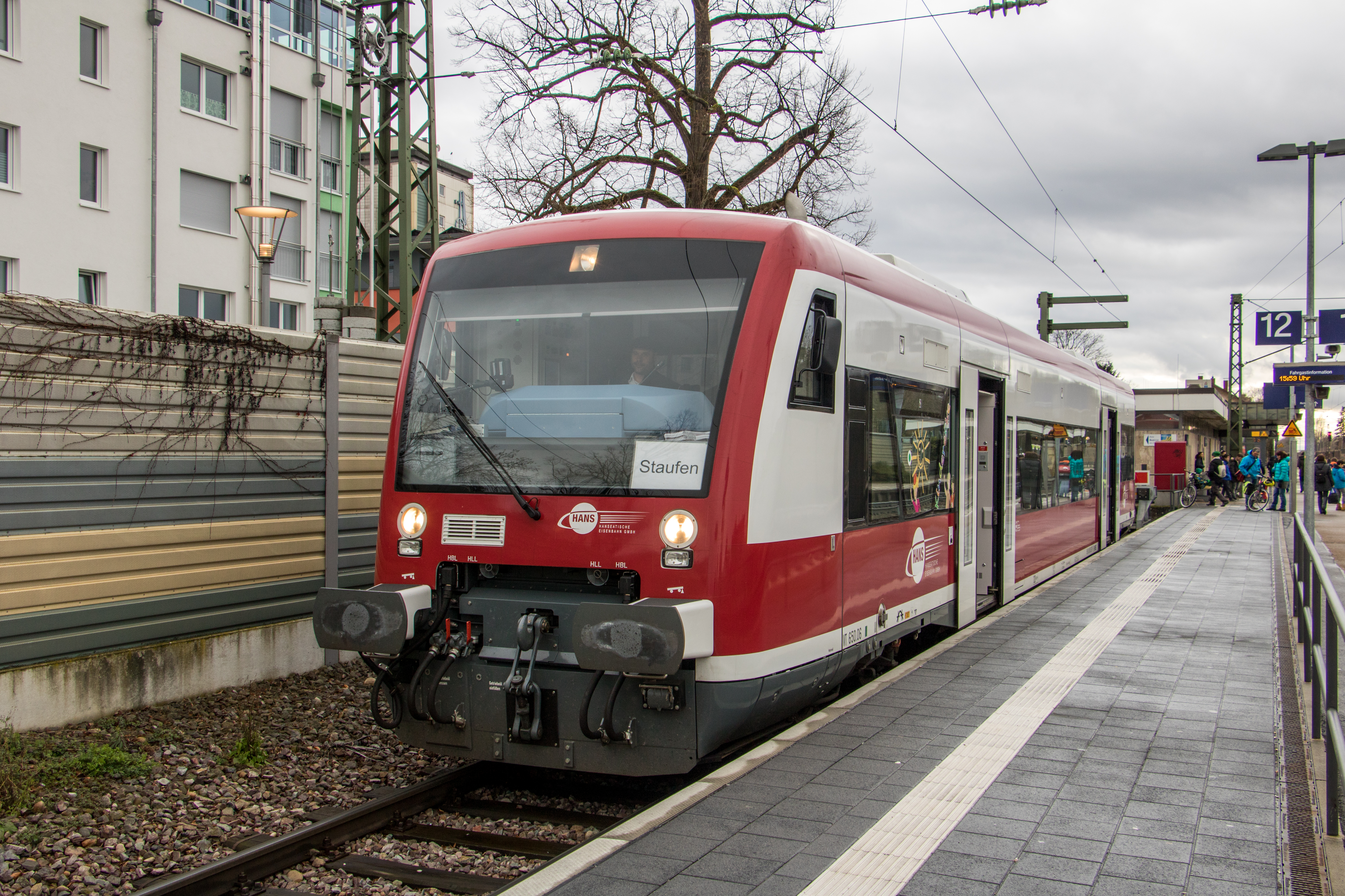 Regio-Shuttle 650.06 van de Hanseatische Eisenbahn in dienst bij de Südwestdeutsche Verkehrs-Aktiengesellschaft op de Münstertalbahn, hier gefotografeerd op station Bad Krozingen.